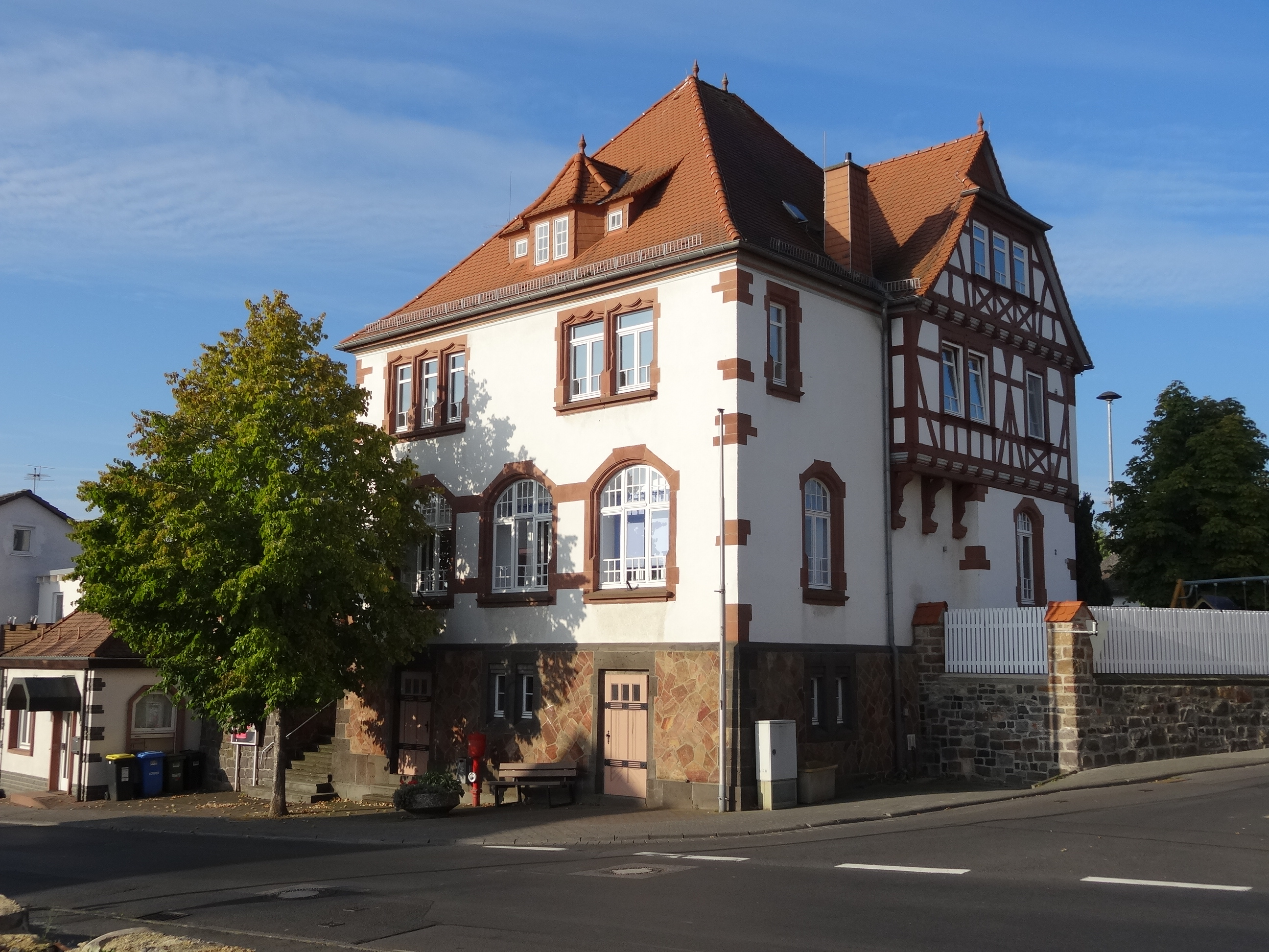 Hangstraße 2 (Dorf-Güll)